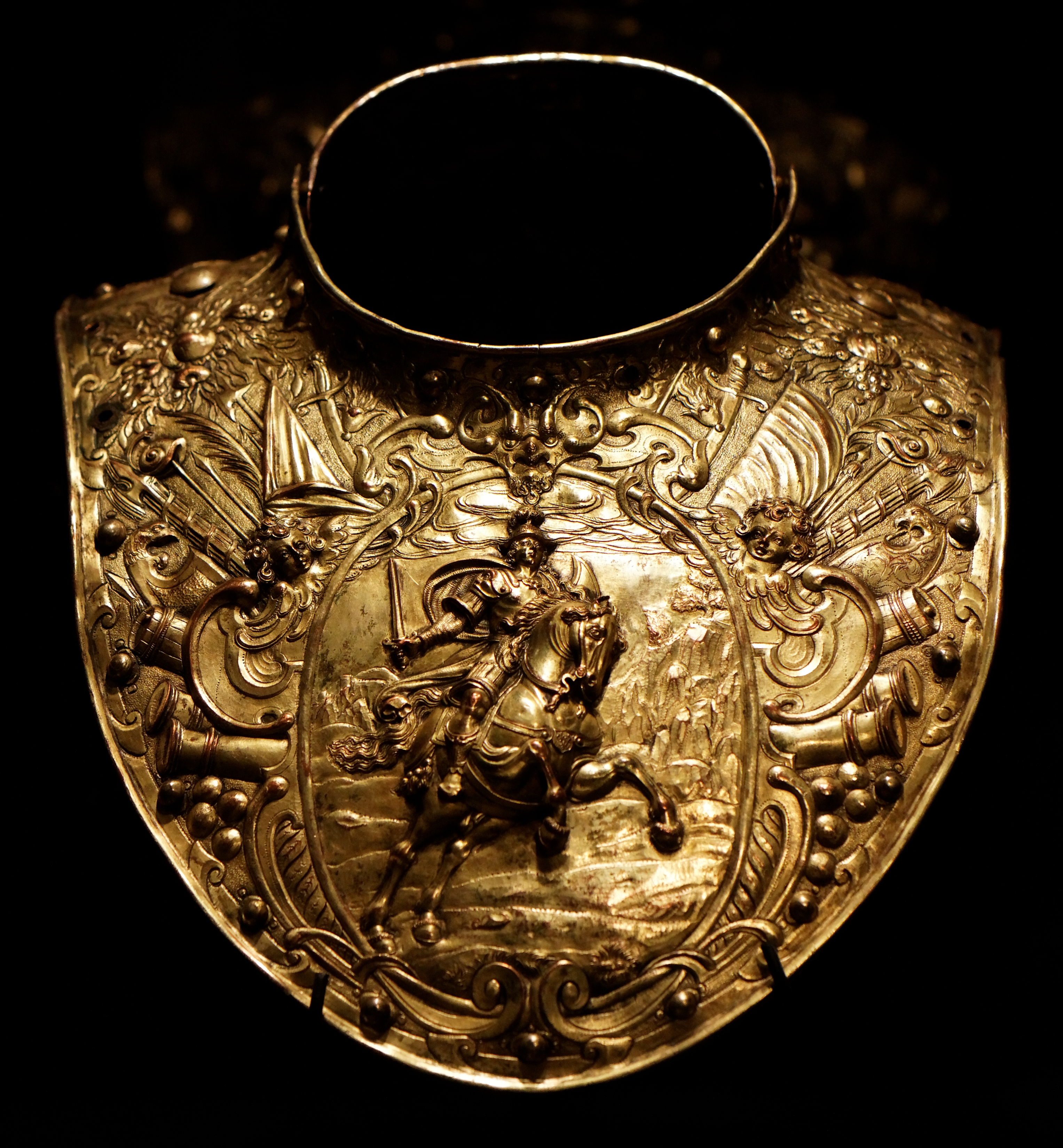 Le colletin dit de Louis XIII présenté lors de l'exposition "sous l'égide de Mars" au musée de l'armée à Paris.